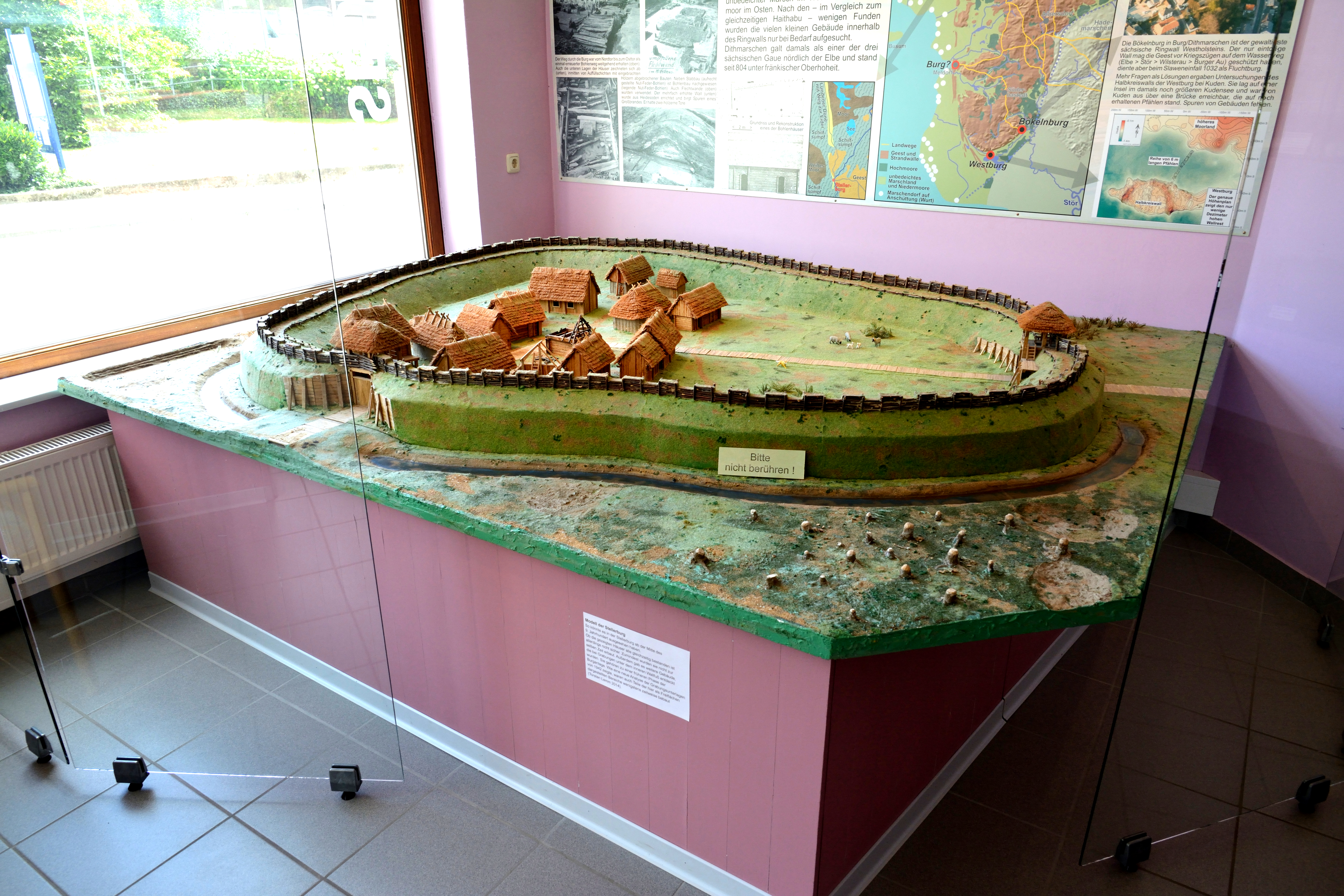 Bilder aus der Ausstellung im Jahr 2019.